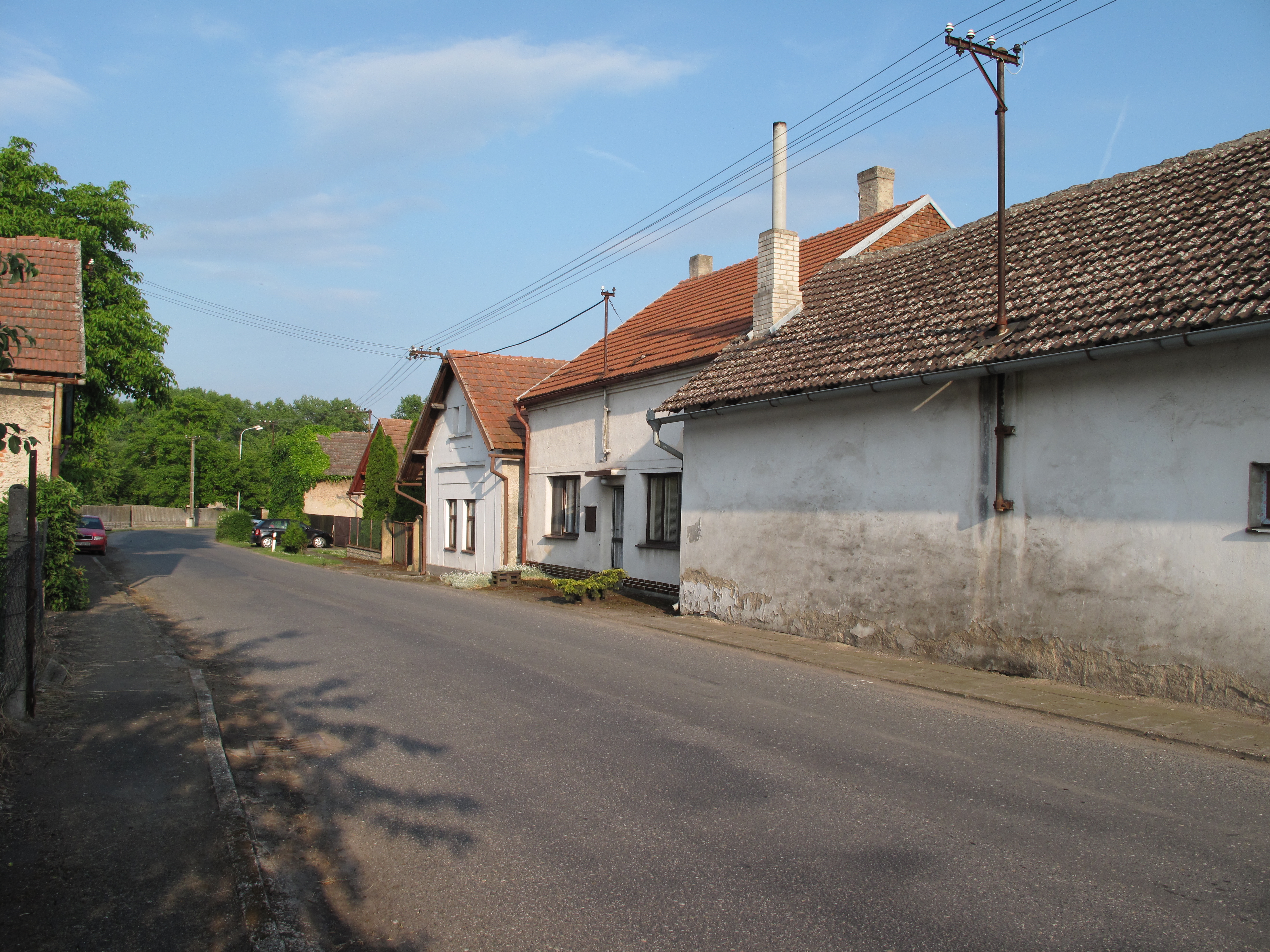 Domy ve Vinici. Okres Nymburk, Česká republika.